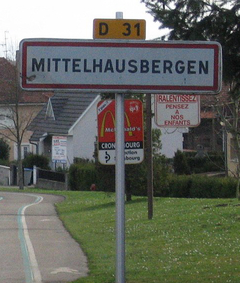 panneau d'entrée dans Mittelhausbergen (Bas-Rhin) en direction de Strasbourg